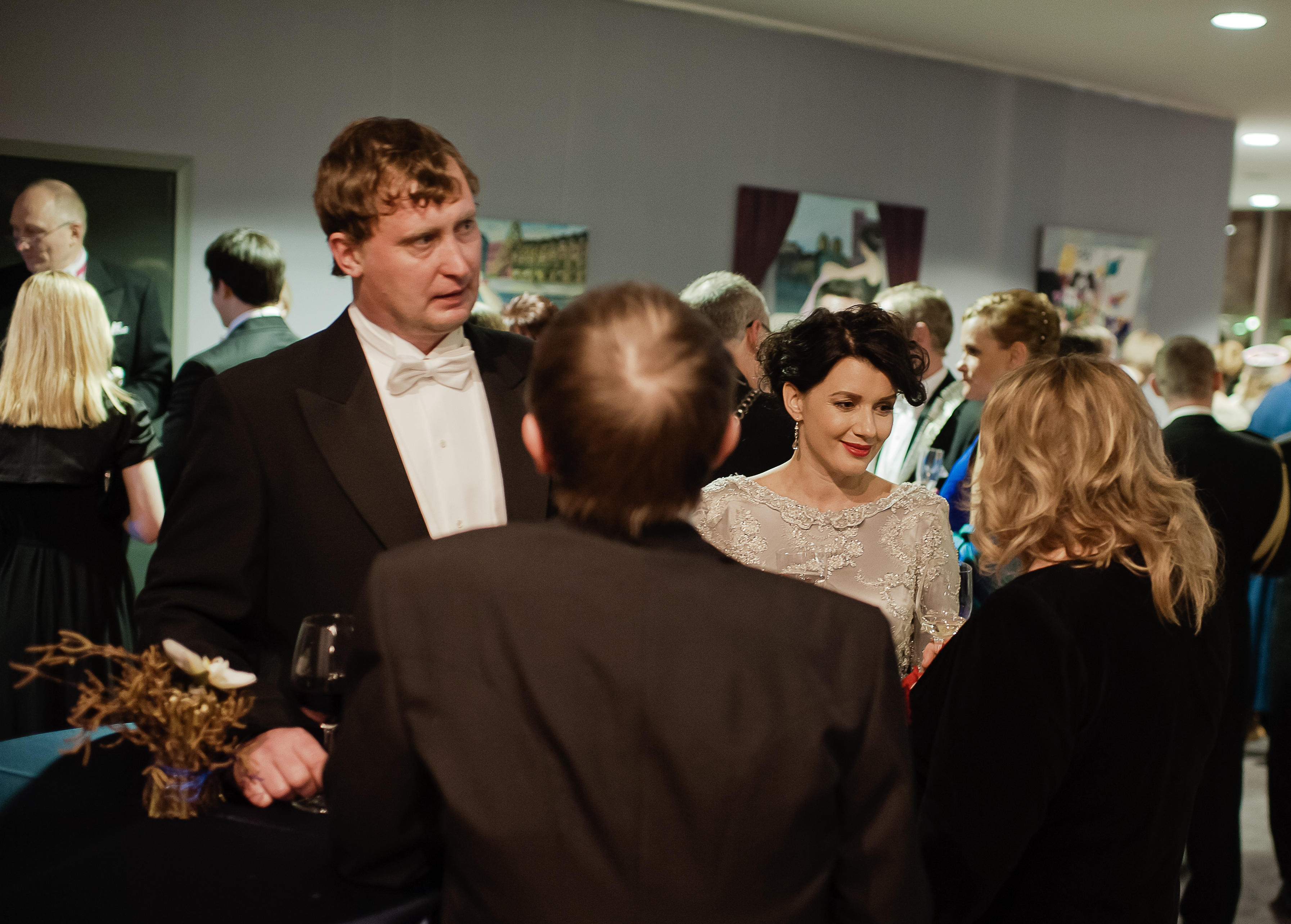 Riigikantselei nõunik Jaanus Rohumaa ja Raadio 2 peatoimetaja Heidy Purga presidendi vastuvõtul.